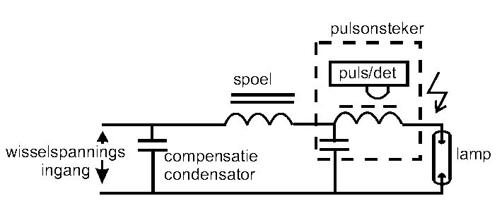 Blokschema HID ballast Zelfgemaakte tekening 7-11-2006